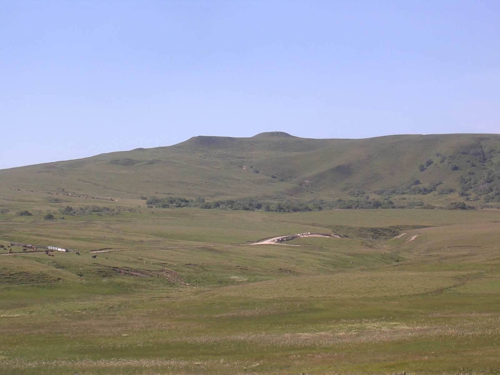 Mont Chamaroux dans le Cézallier (Puy-de-Dôme)